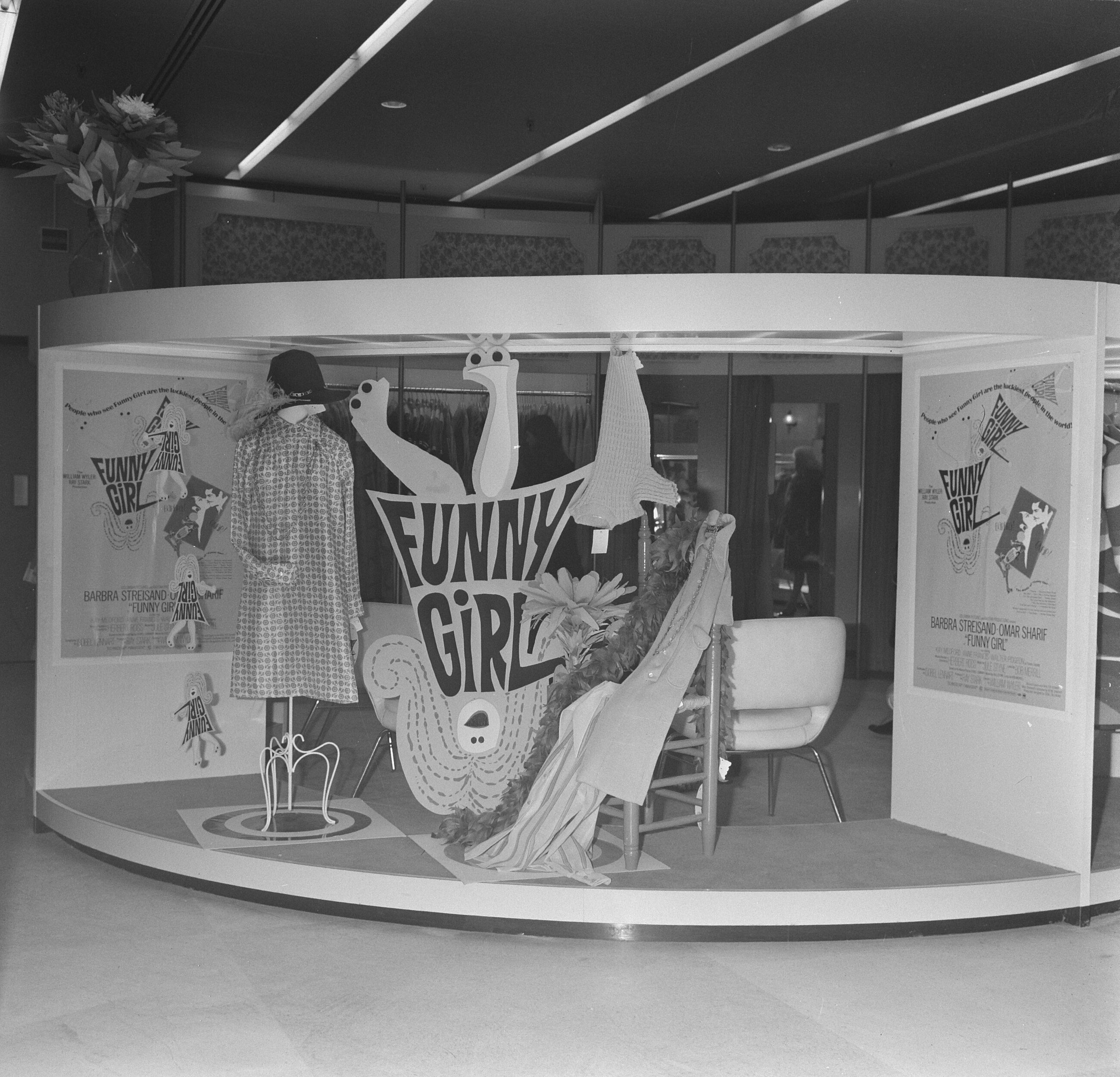 Collectie / Archief : Fotocollectie Anefo Reportage / Serie : [ onbekend ] Beschrijving : Serie. Reclamecampagne film "Funny Girl" (in Cinema Du Midi te Amsterdam). Etalage Datum : 28 februari 1969 Locatie : Amsterdam, Noord-Holland Trefwoorden : etalages, films, reclame Fotograaf : Mieremet, Rob / Anefo Auteursrechthebbende : Nationaal Archief Materiaalsoort : Negatief (zwart/wit) Nummer archiefinventaris : bekijk toegang 2.24.01.03 Bestanddeelnummer : 922-1482